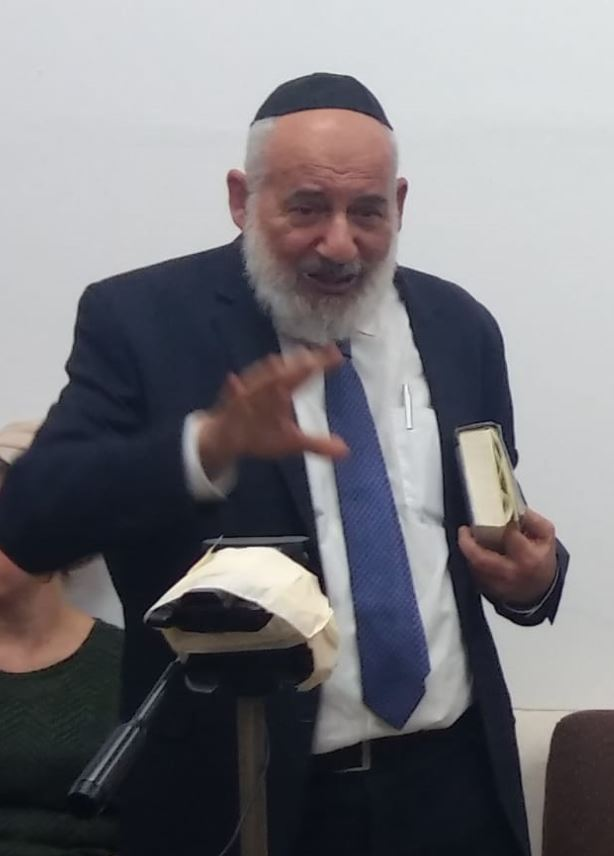 הרב אברהם וינגורט